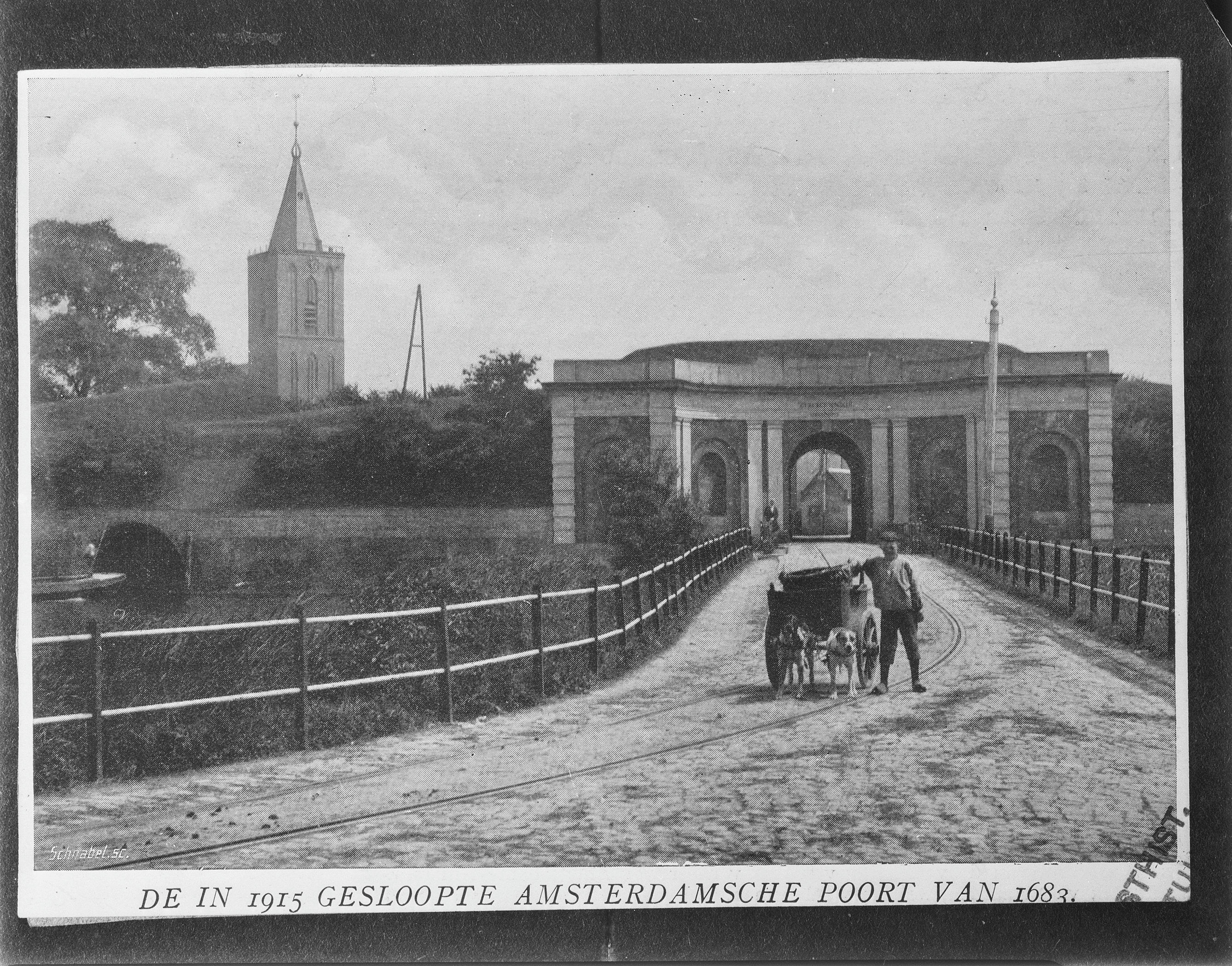 Amsterdamse Poort: reproductie van prentbriefkaart